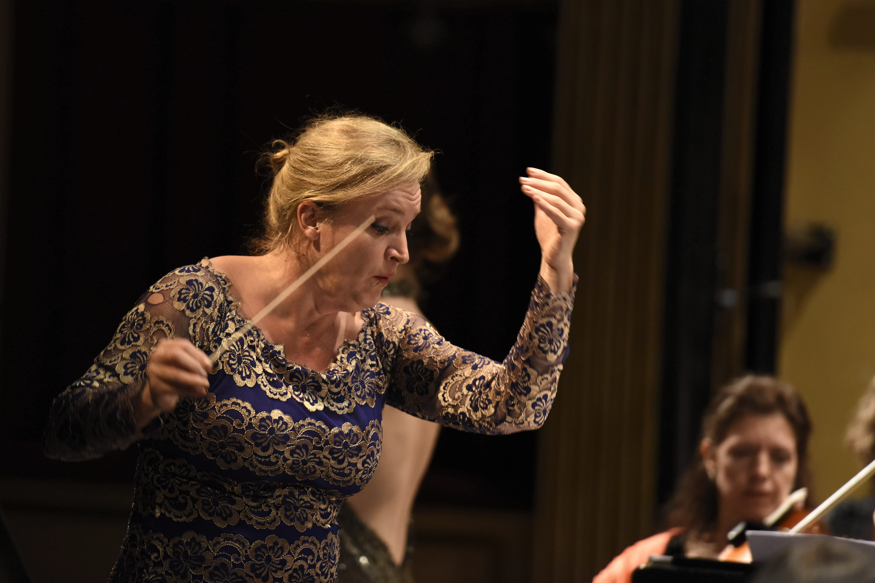 Ligia Amadio, directora de la Orquesta Filarmónica de Montevideo. Concierto de la Orquesta Filarmonica en el Mes de las Mujeres, Teatro Solís. Marzo de 2017.